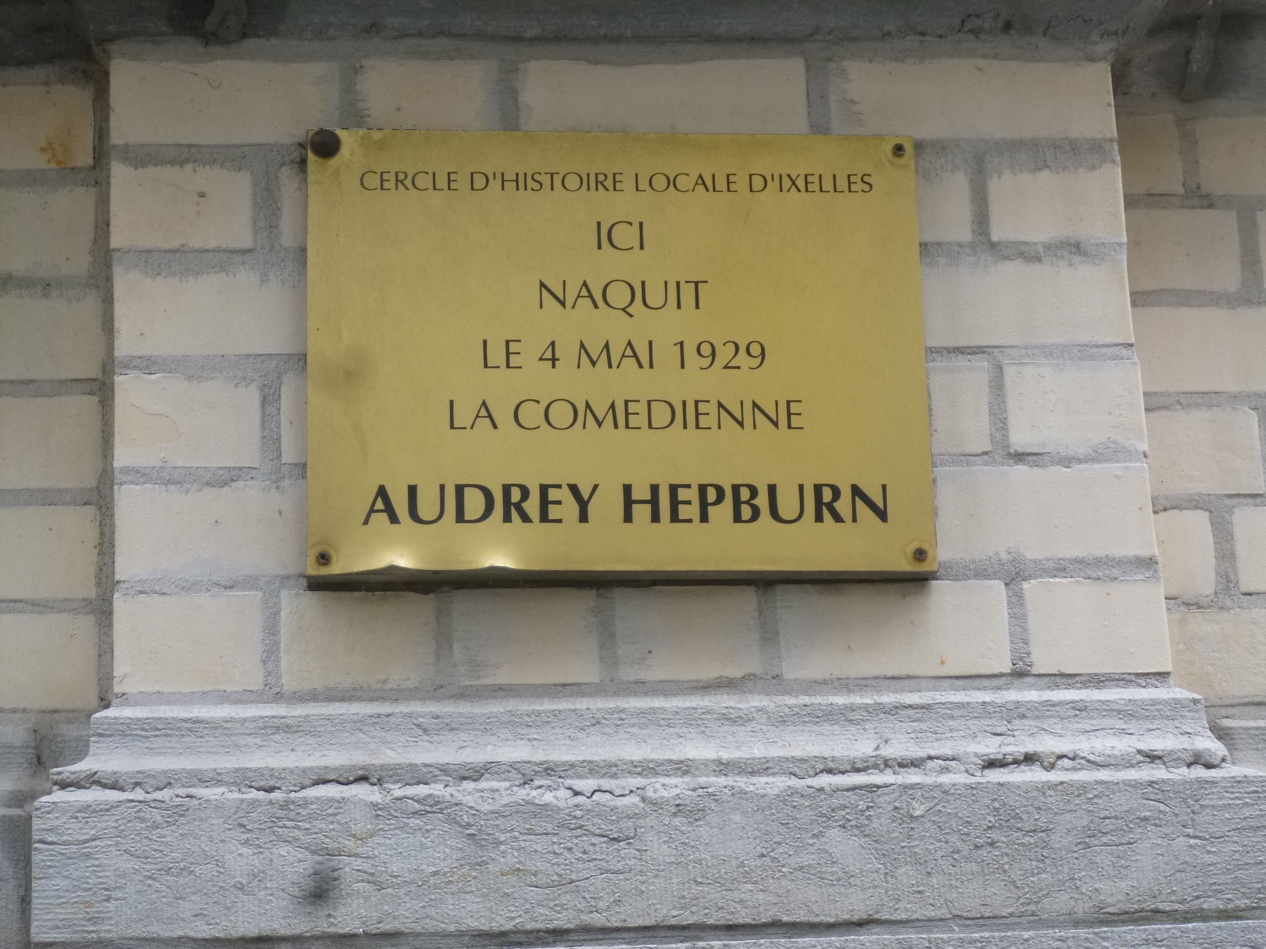 Audrey Hepburn Plaque in Ixelles/Elsene